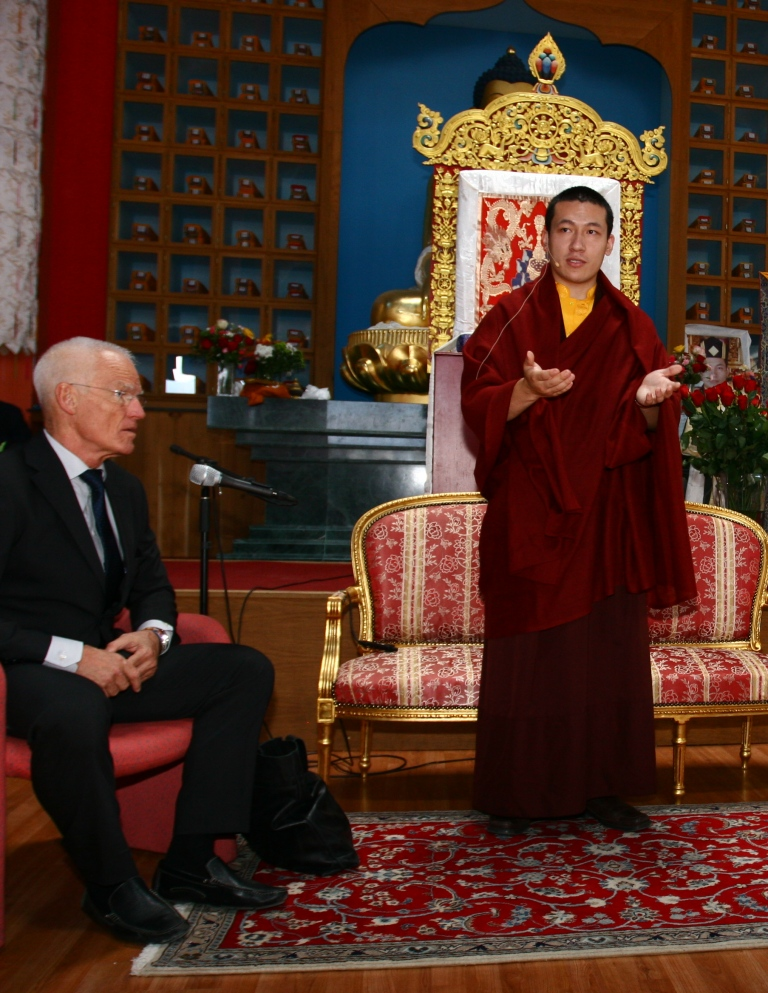 Визит Семнадцатого Кармапы Тринле Тхае Дордже в Карма Гён, июнь, 2009г.